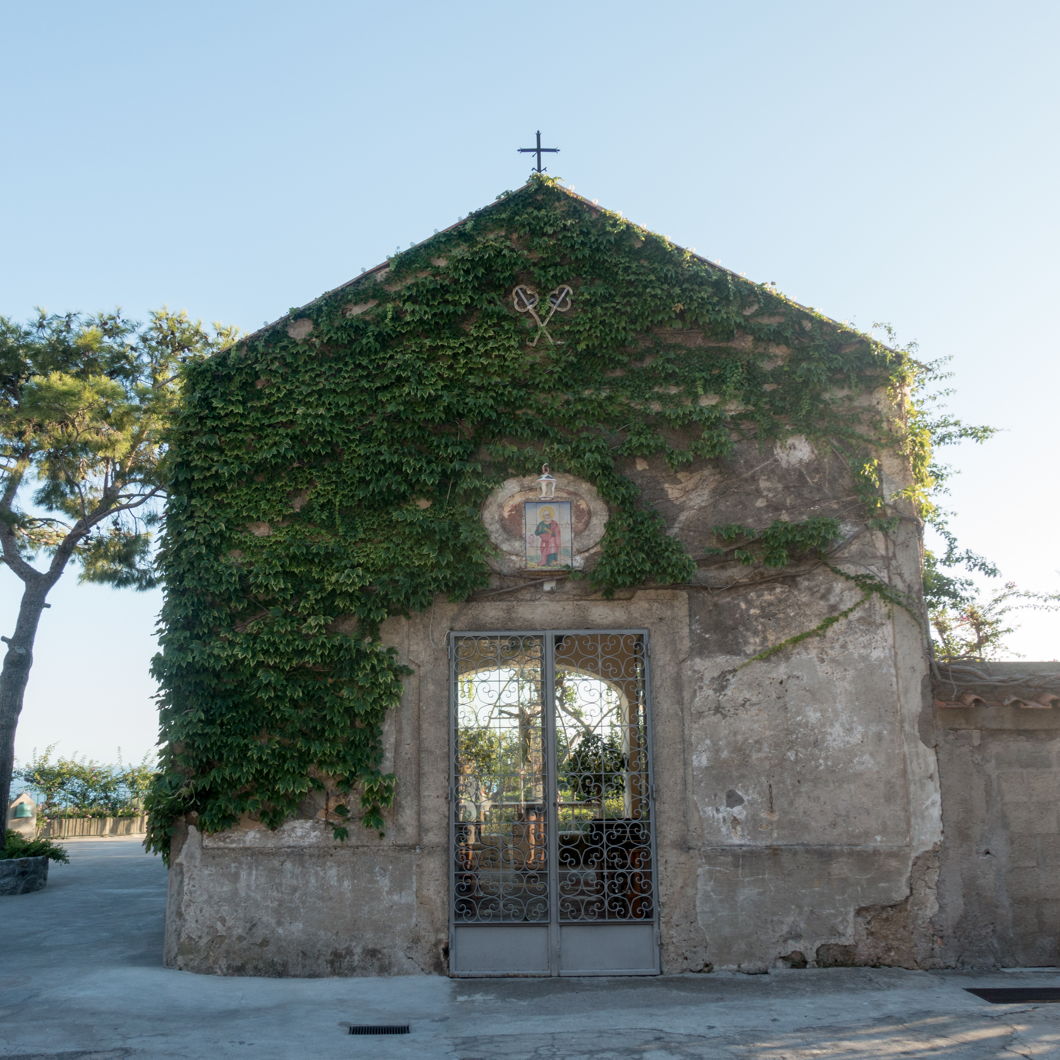 Roadside entrance of Il San Pietro di Positano.